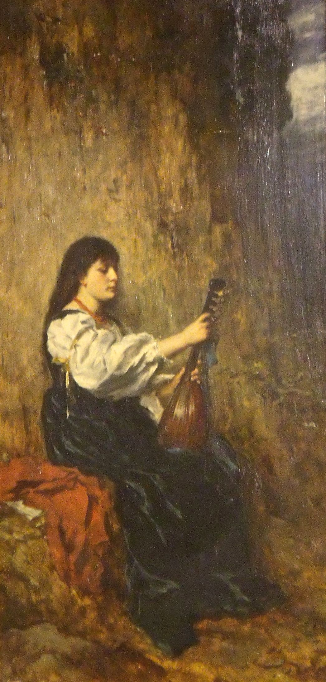 painting